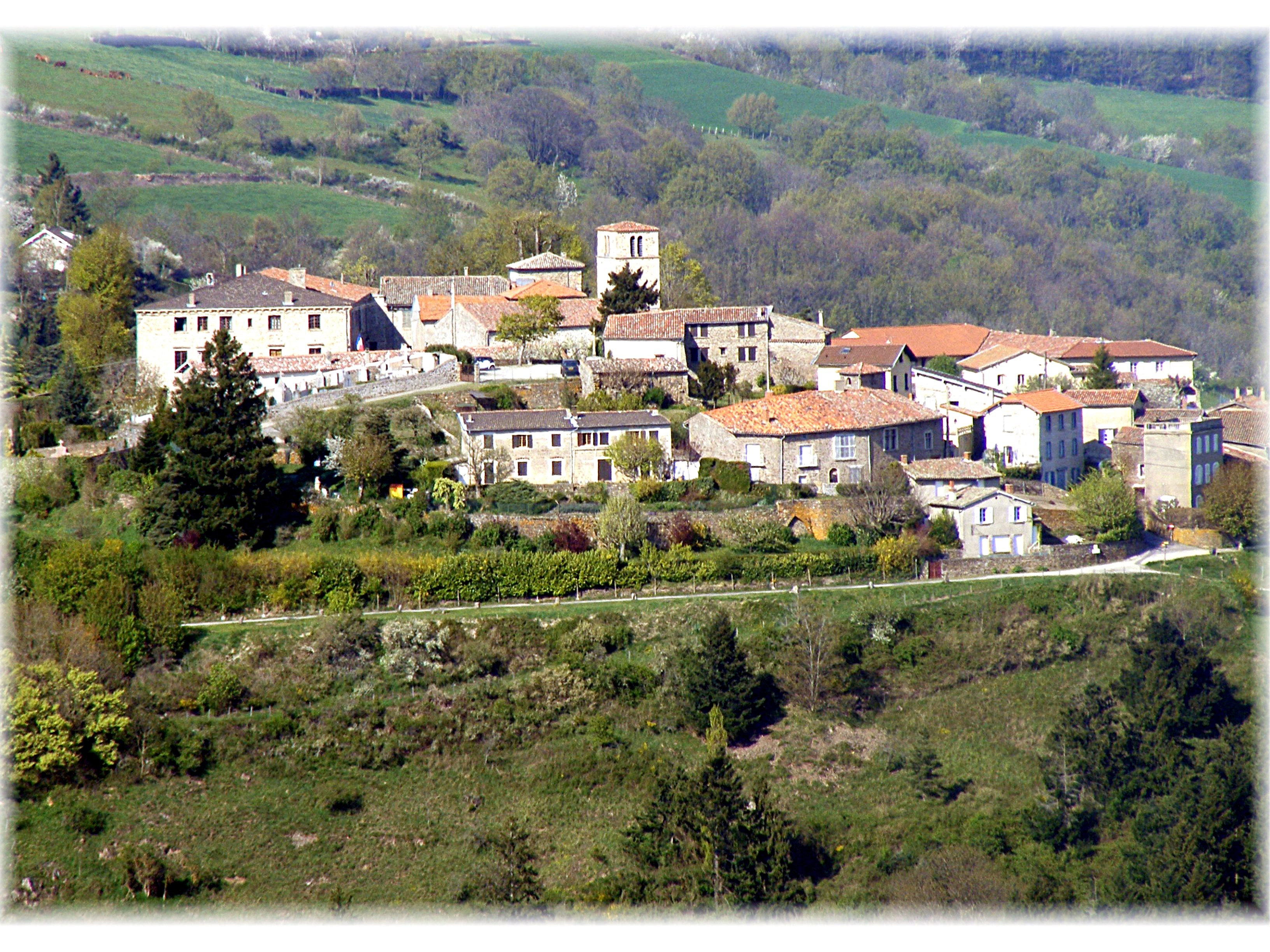 Le village médiéval de Riverie dominant le Plateau lyonnais